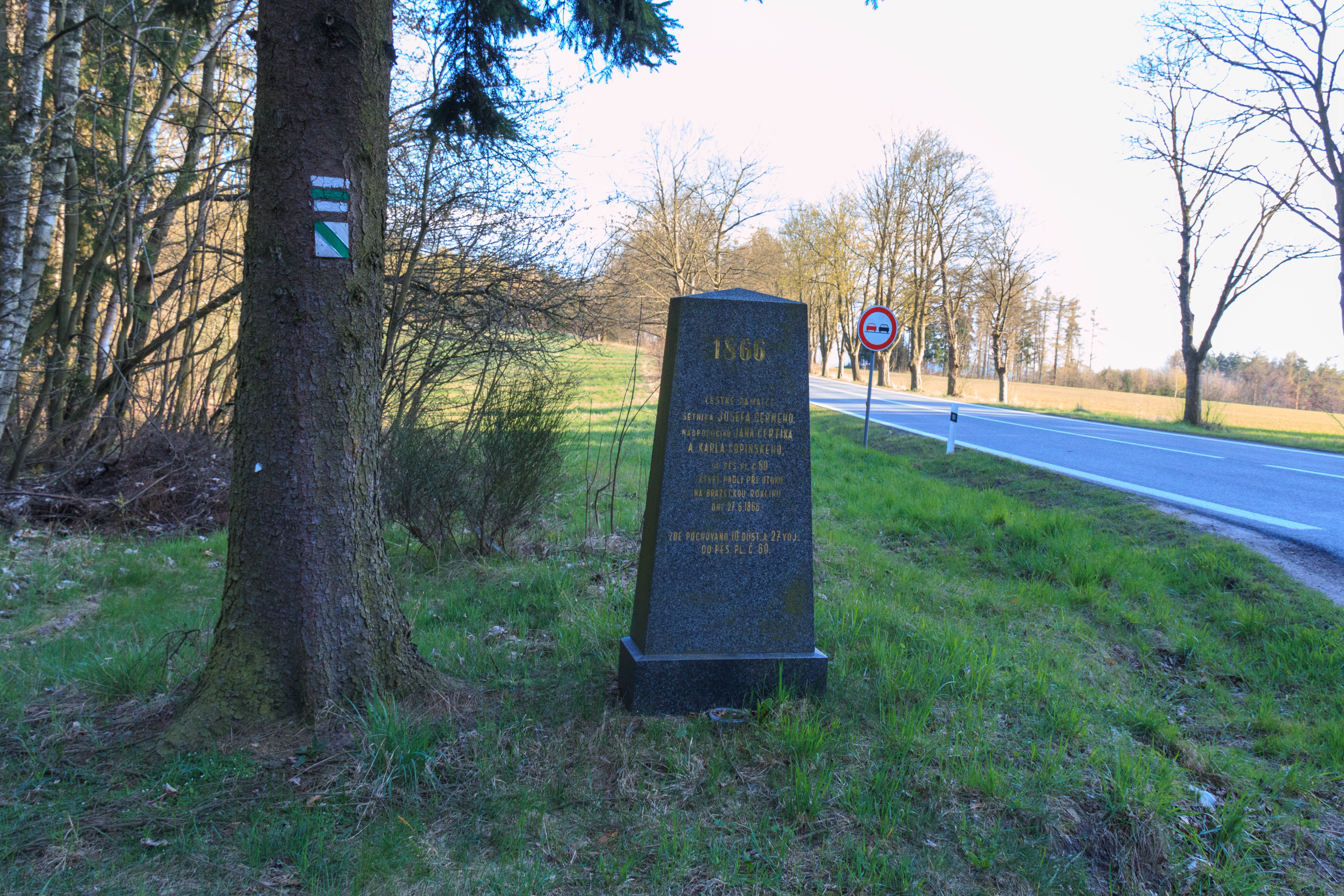 Pomník padlých z bitvy u Náchoda na křižovatce do Bražce